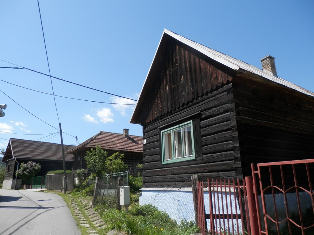 Obec Vislanka. Okres Stará Ľubovňa.